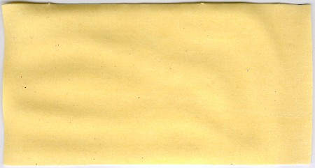 Pastasorten Lasagne